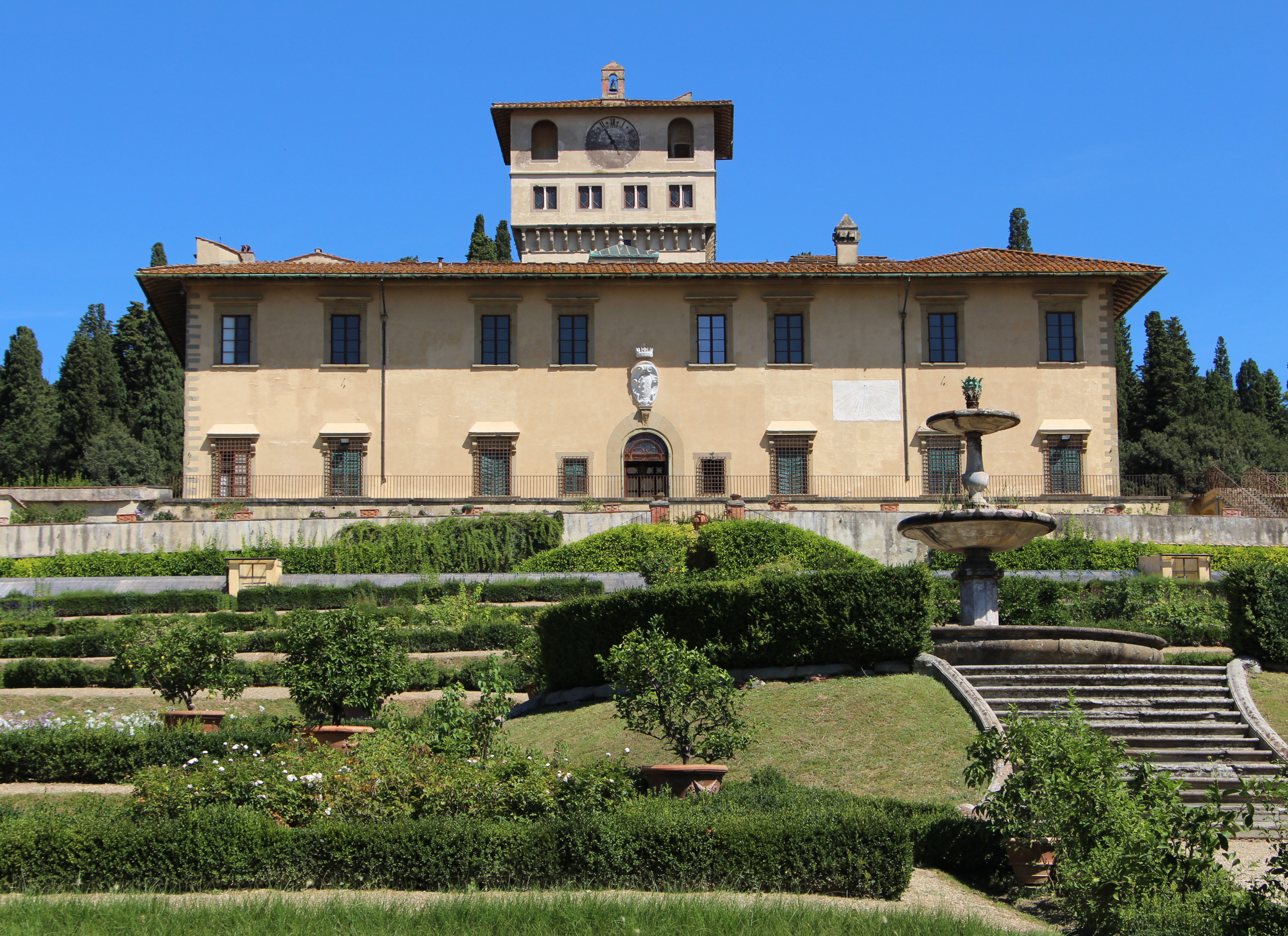 Villa medicea della Petraia - MIBAC The making of this document was supported by Wikimedia CH. (Submit your project!) For all the files concerned, please see the category Supported by Wikimedia CH. This is a photo of a monument which is part of cultural heritage of Italy.